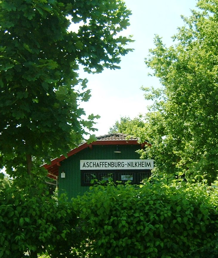 alter Bahnhof Nilkheim - Aschaffenburg am Rand des Schönbuschs